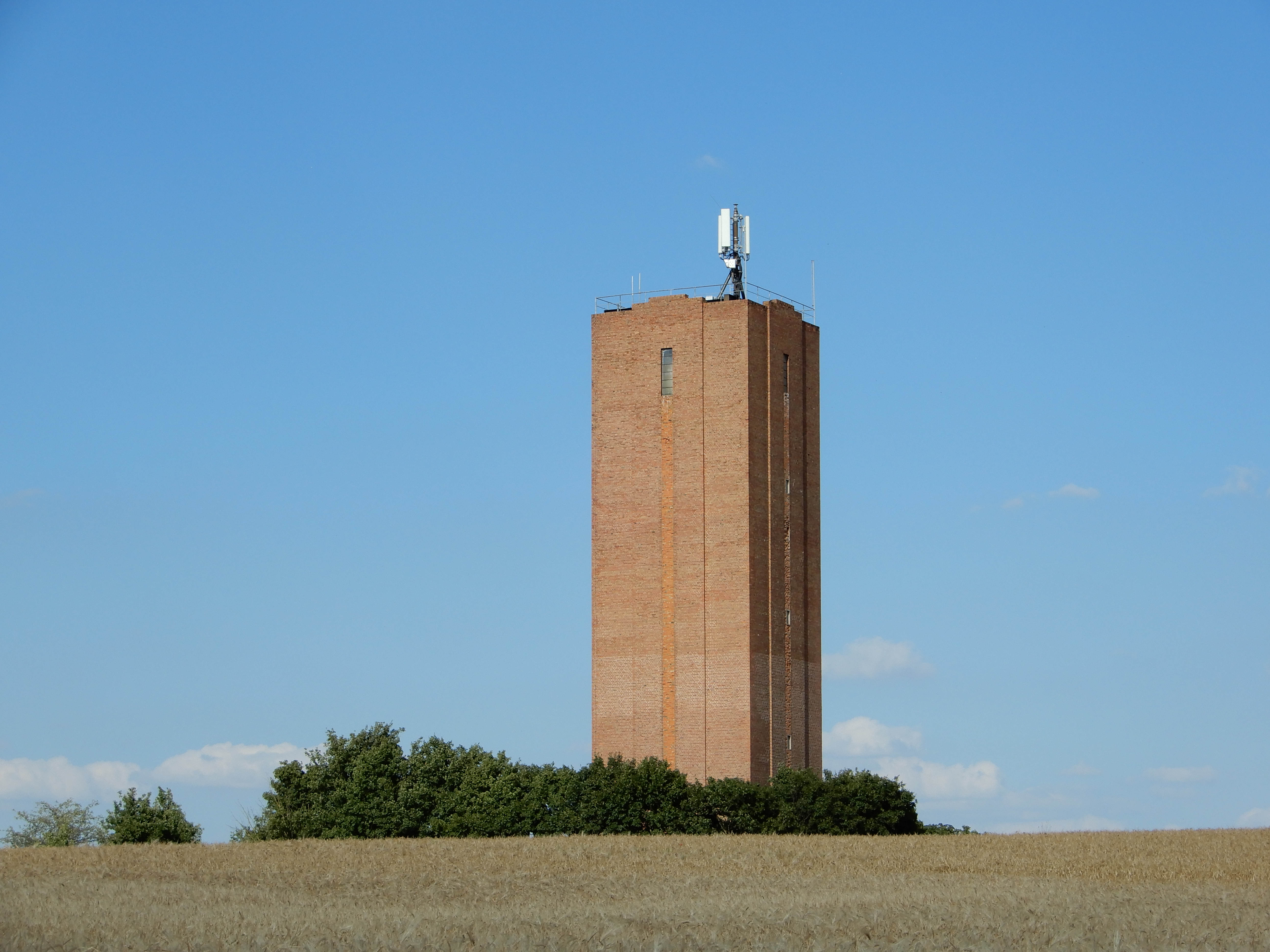 Wasserturm Hoym